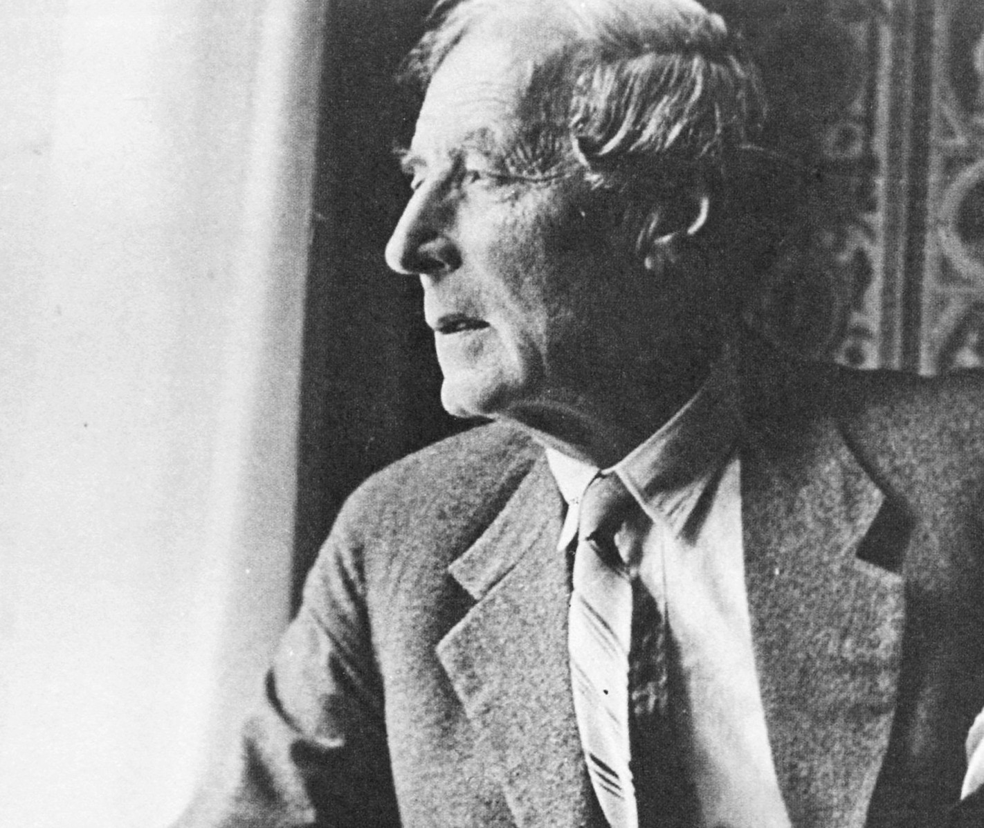 Ragnar Östberg 1934